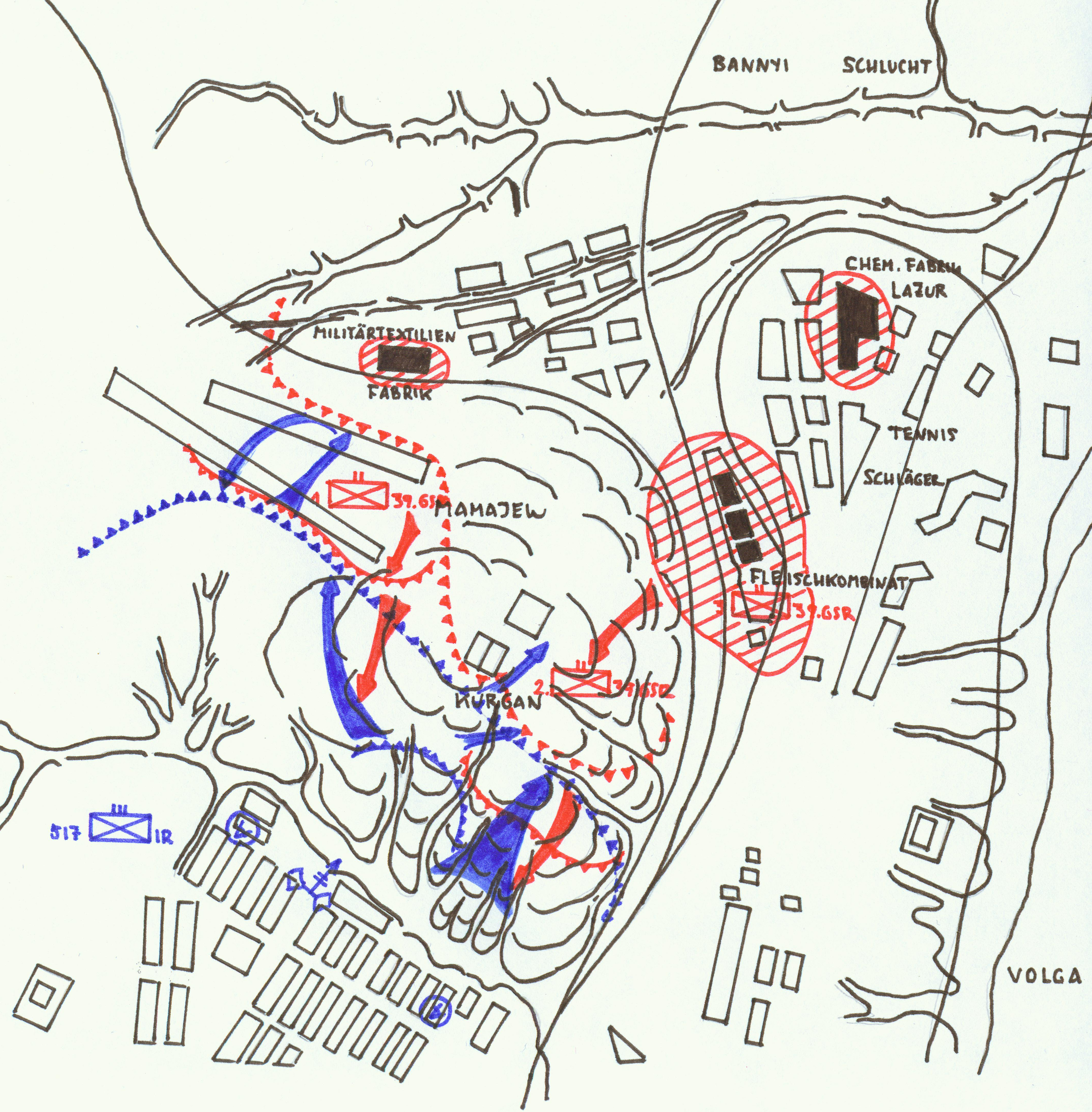 Stalingrad Mamajev Kurgan from 16. to 17. September 1942